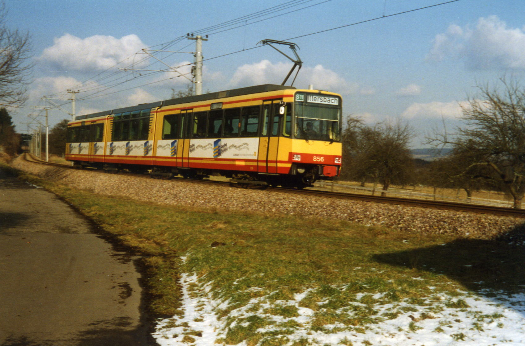 Albtalbahn-Wagen bei Ittersbach